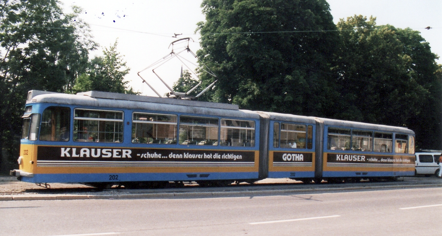 Triebwagen 202 (Gothawagen G4-65) der Naumburger Straßenbahn (ehm. Tw 202 der Straßenbahn Gotha) während einer Parade in Naumburg im Jahre 2003